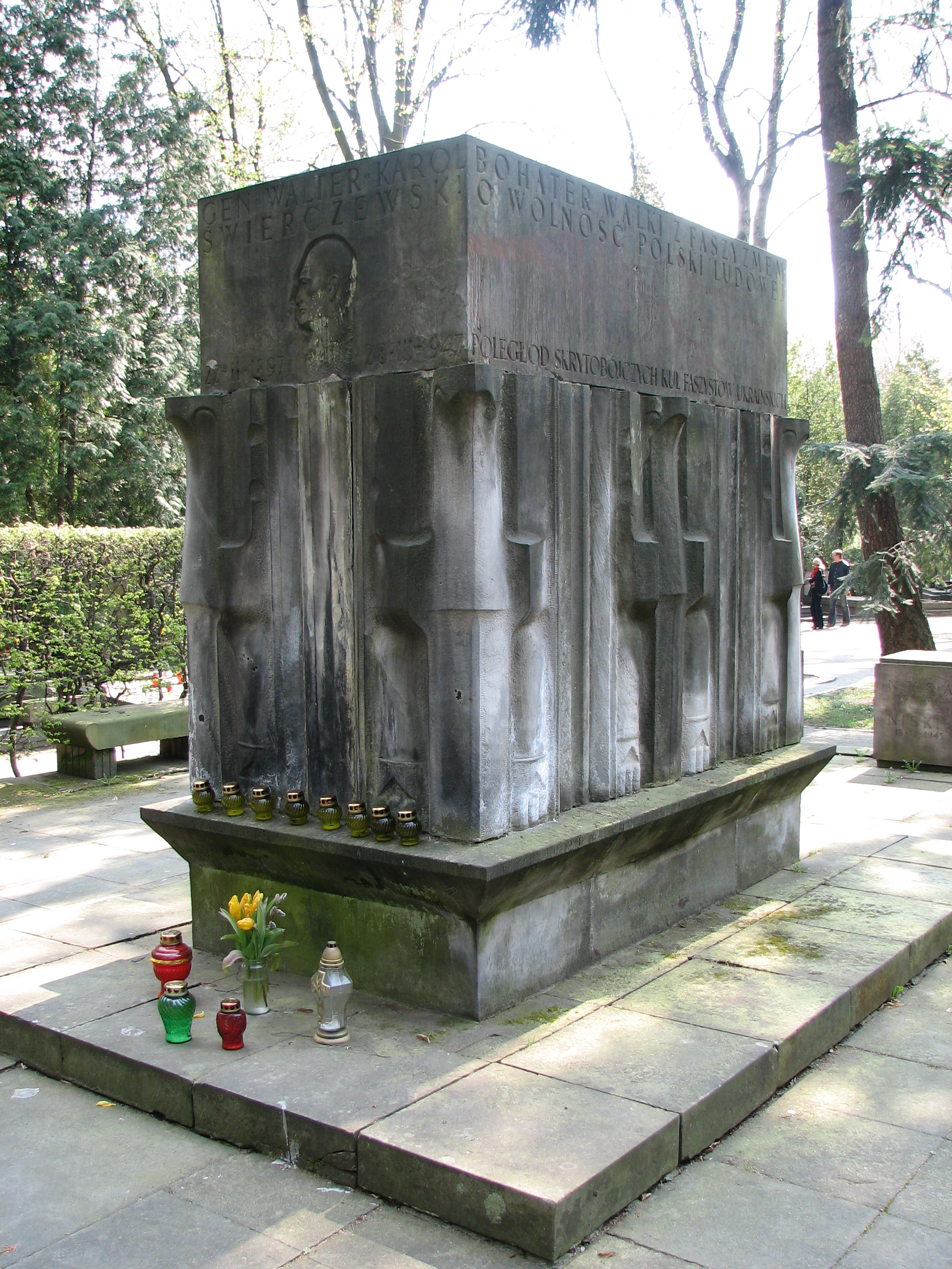 Karol Świerczewski grób - Warszawa, Cmentarz Wojskowy na Powązkach